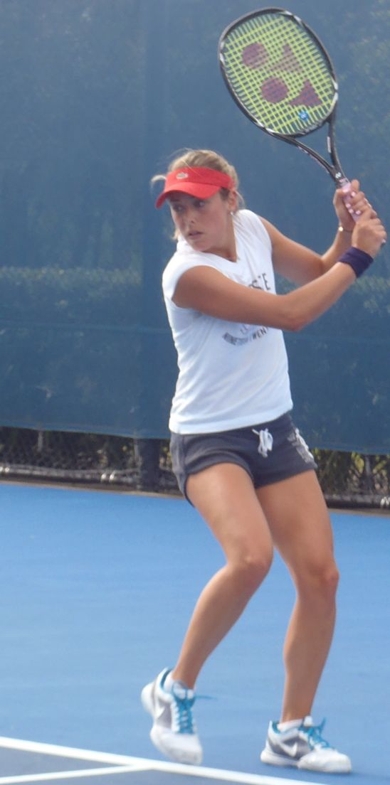 Lors d'un entrainement à Sydney